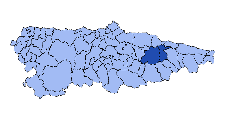 Concejos que forman la mancomunidad asturiana de los Concejos de Parres y Piloña